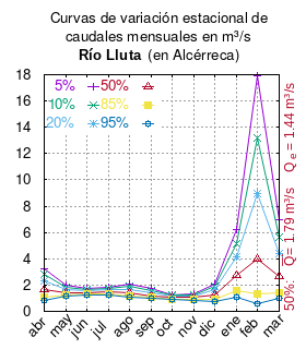 Curva de Variación Estacional del río Lluta en Alcérreca. # cita publicación # | apellido = Dirección General de Aguas # | nombre = # | enlace-autor = Ministerio de Obras Públicas (Chile) # | título = Diagnóstico y clasificación de los cursos y cuerpos de agua según objetivos de calidad. Cuenca del río Lluta # | ubicación = Santiago de Chile # | editorial = Ministerio de Obras Públicas (Chile) # | año = 2004 # | edición = # | url = # | ref = harv # Tabla 4.3: Estación: Lluta en Alcérreca # pág. 34 mes 5% 10% 20% 50% 85% 95% abr 3.26 2.80 2.34 1.66 1.08 0.84 may 1.95 1.80 1.65 1.42 1.22 1.12 jun 1.77 1.68 1.58 1.44 1.31 1.25 jul 1.84 1.77 1.68 1.53 1.36 1.27 ago 2.04 1.87 1.70 1.43 1.20 1.09 sep 1.73 1.57 1.41 1.19 1.04 0.98 oct 1.25 1.21 1.16 1.06 0.95 0.88 nov 1.33 1.27 1.20 1.08 0.92 0.83 dic 2.09 1.87 1.63 1.26 0.91 0.76 ene 6.18 5.18 4.17 2.72 1.55 1.07 feb 17.93 13.23 8.96 3.99 1.29 0.61 mar 6.99 5.64 4.36 2.66 1.44 1.01